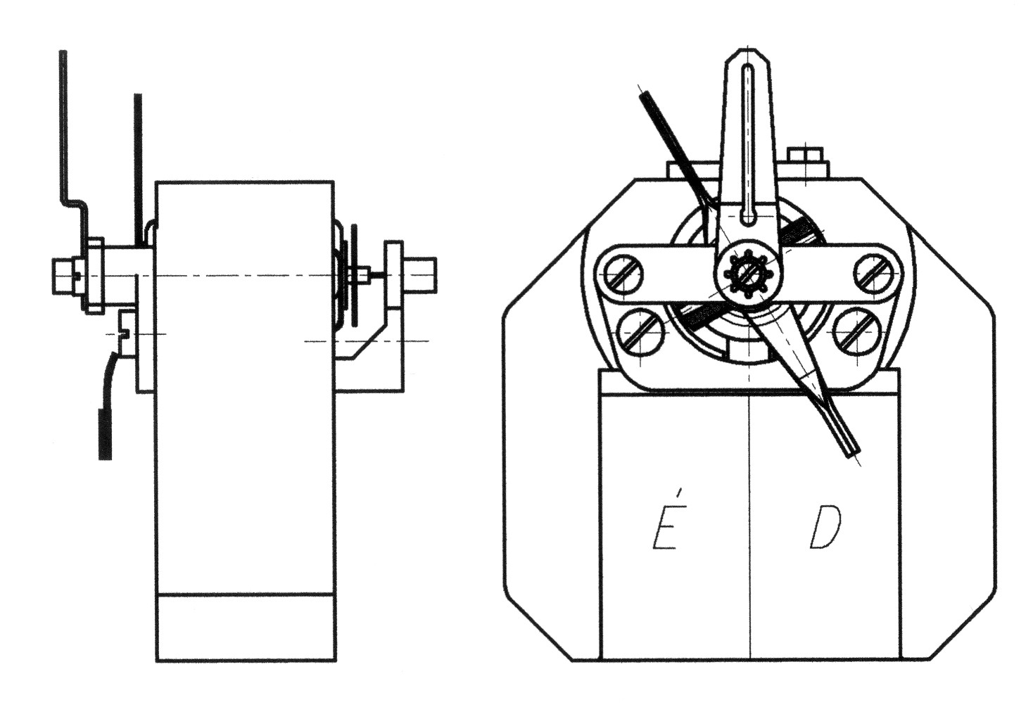 Külső mágneses deprez műszer mérőműve